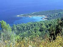 Mlaska, uvala na otoku Hvaru